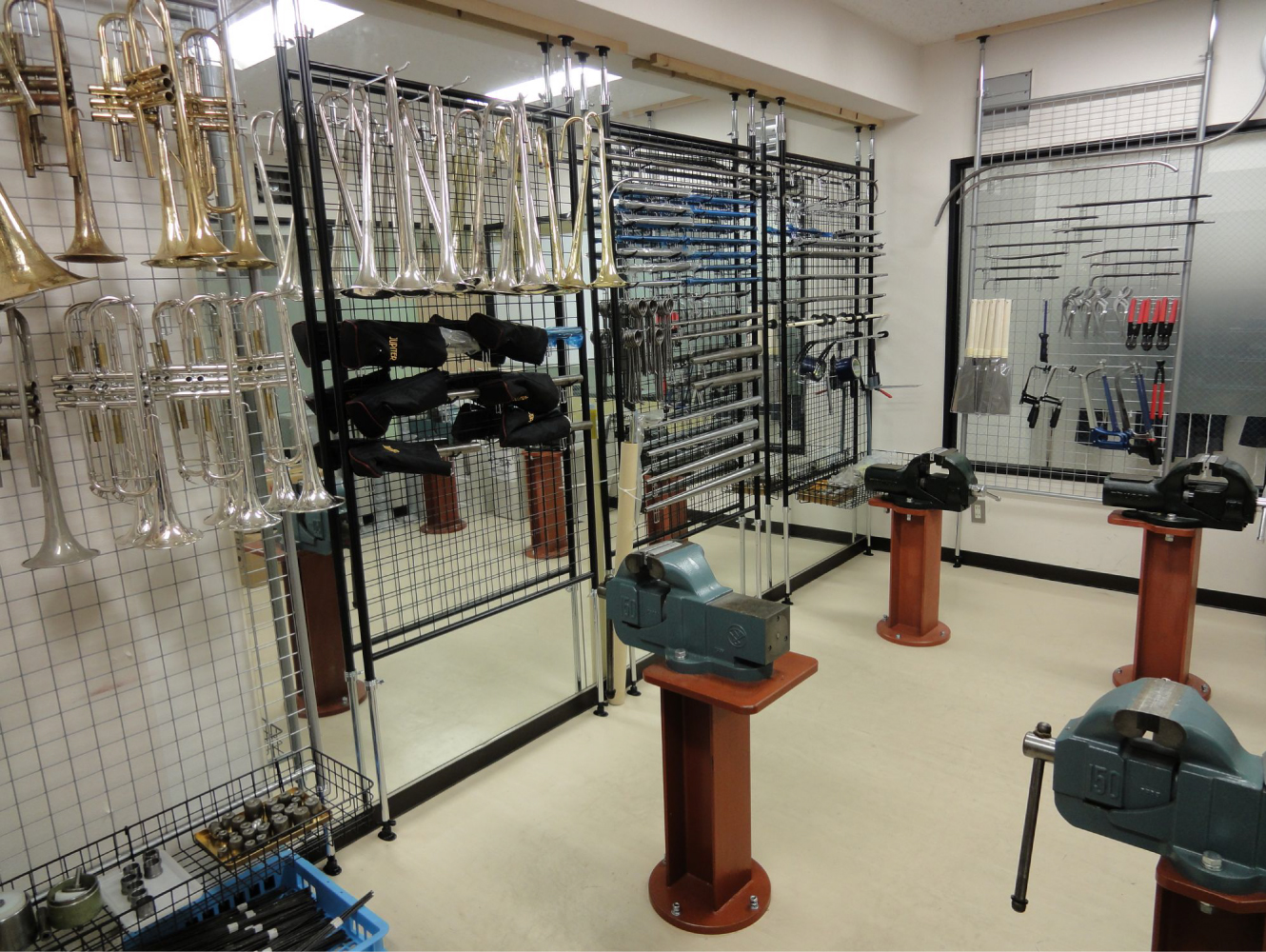 代官山音楽院金管加工室